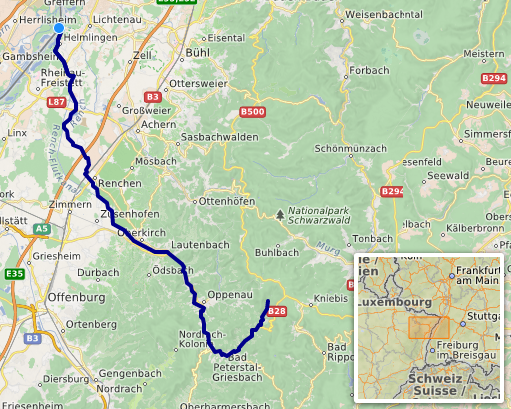 carte réalisée sur umap [1]